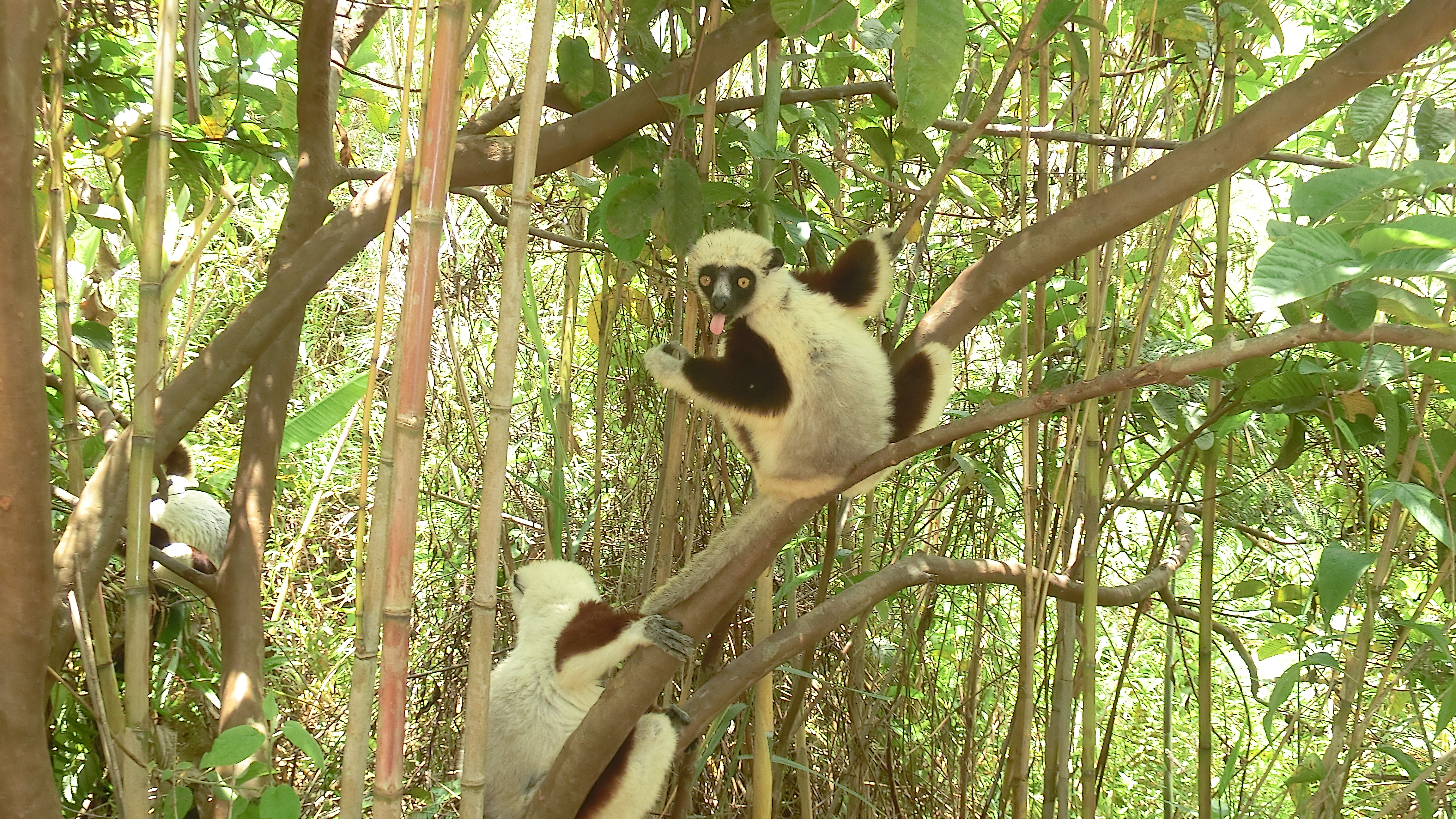 Propithecus coquereli